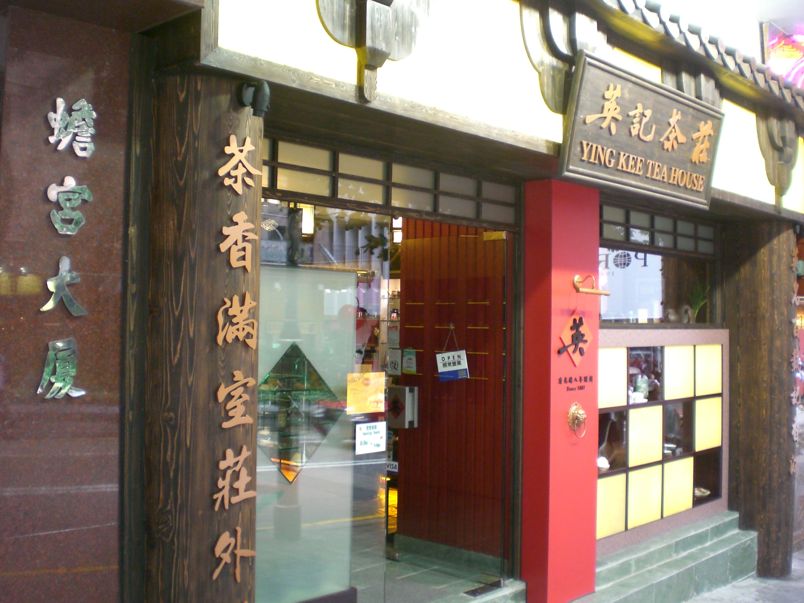 Author= Kwanyatsw 英記茶莊